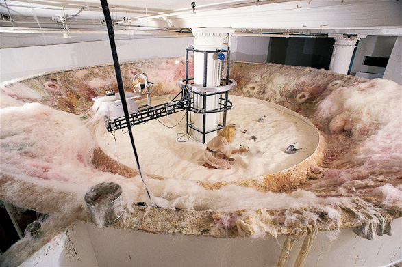 installation